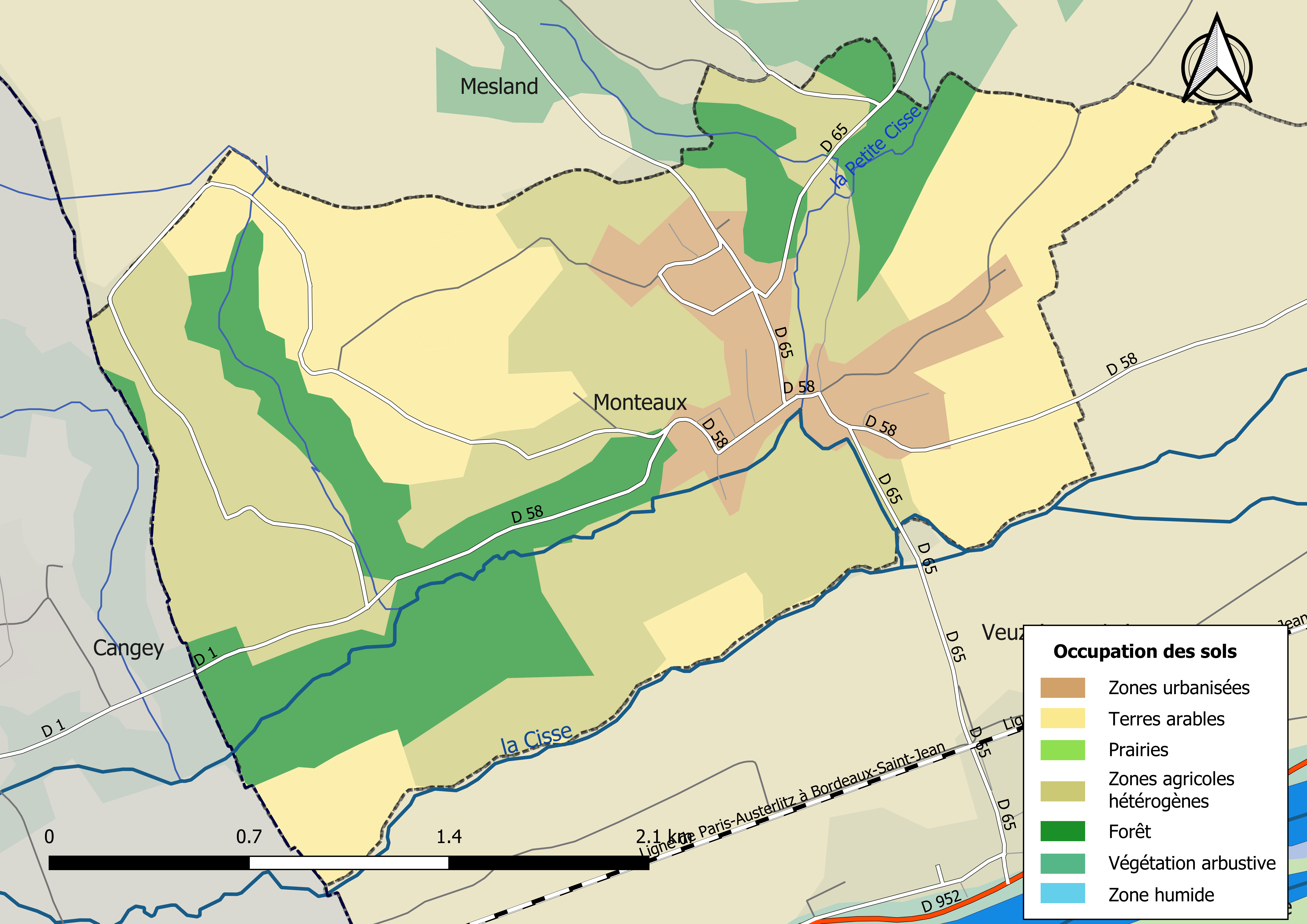 Carte des infrastructures et de l’occupation des sols en 2018 de la commune de Monteaux (France).